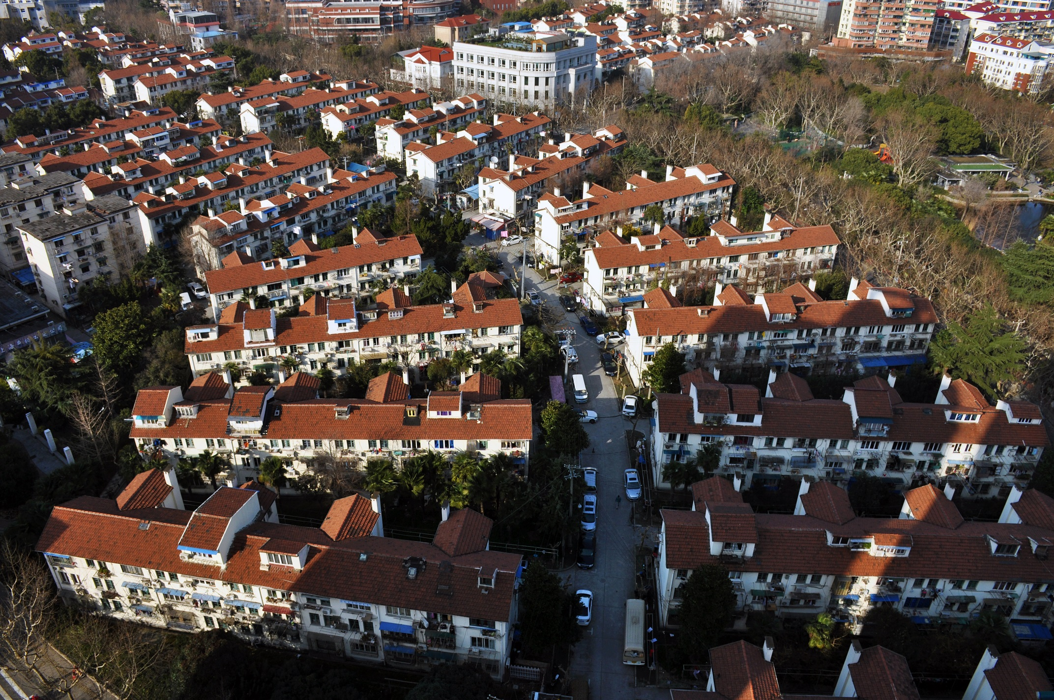 曹杨一村 枫桥路、梅岭北路、棠浦路、花溪路、兰溪路范围内 建于1952年